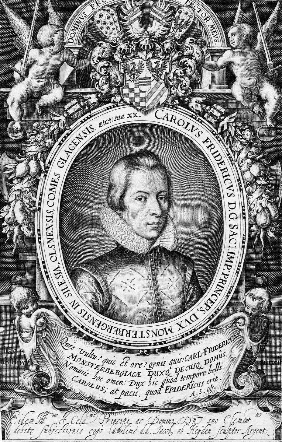 Karol Fryderyk I Podiebradowicz - miedzioryt